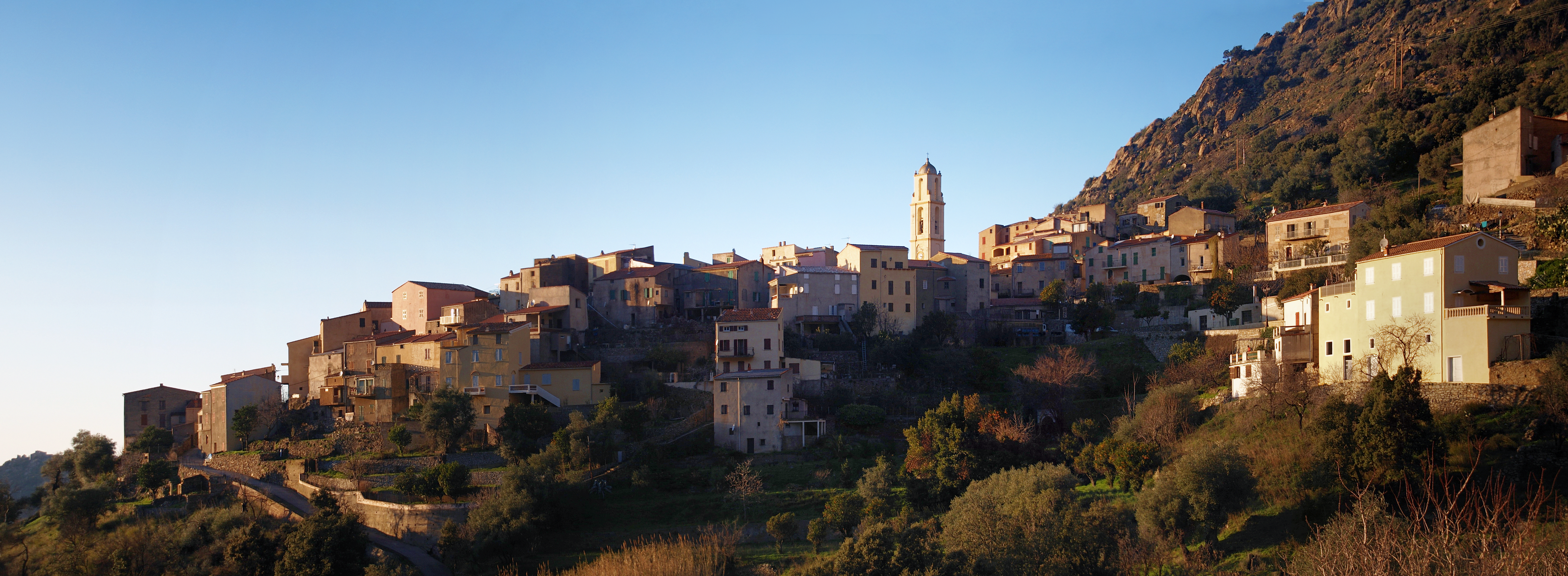 Zilia, Balagna (Corse) - Panorama de Zilia